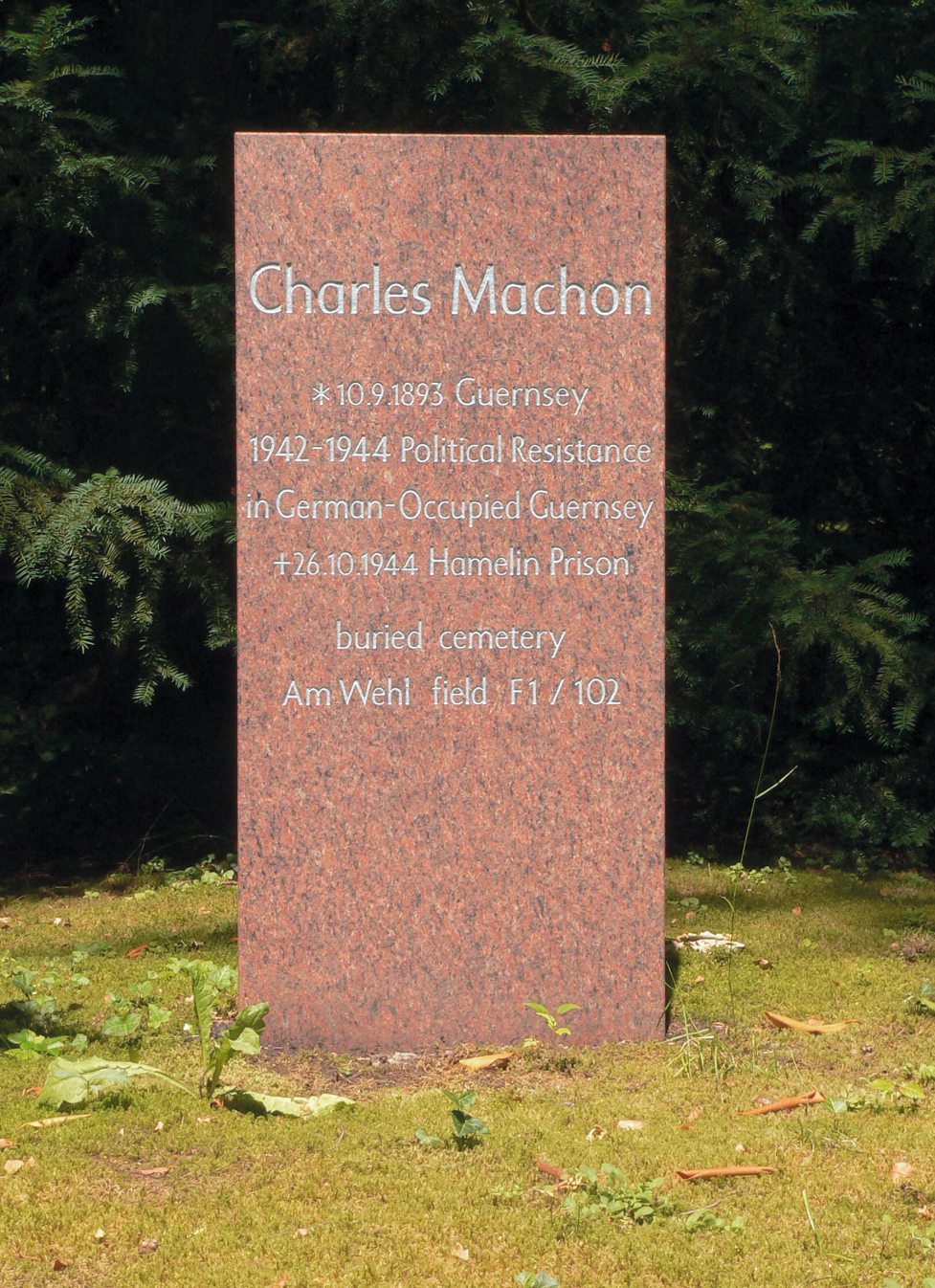 Gedenkstein Charles Machon